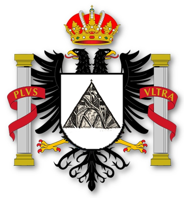 Escudo otorgado por Carlo V